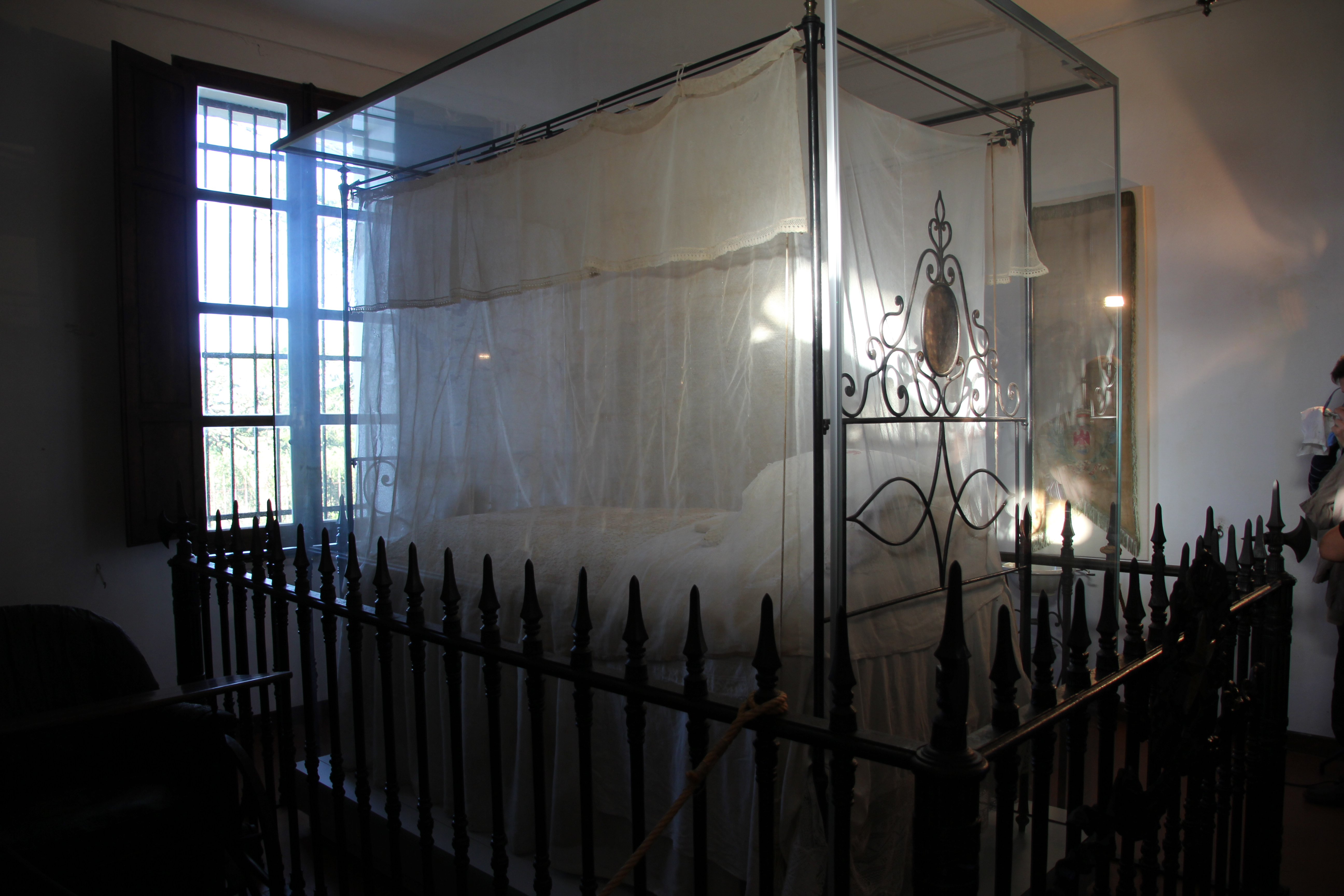 La Maddalena, compendio garibaldino di Caprera